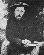 Allan Edson (1846-1888). Tiré de : Missisquoi County Historical Society, Seventh Annual Report, 1961, p. 107